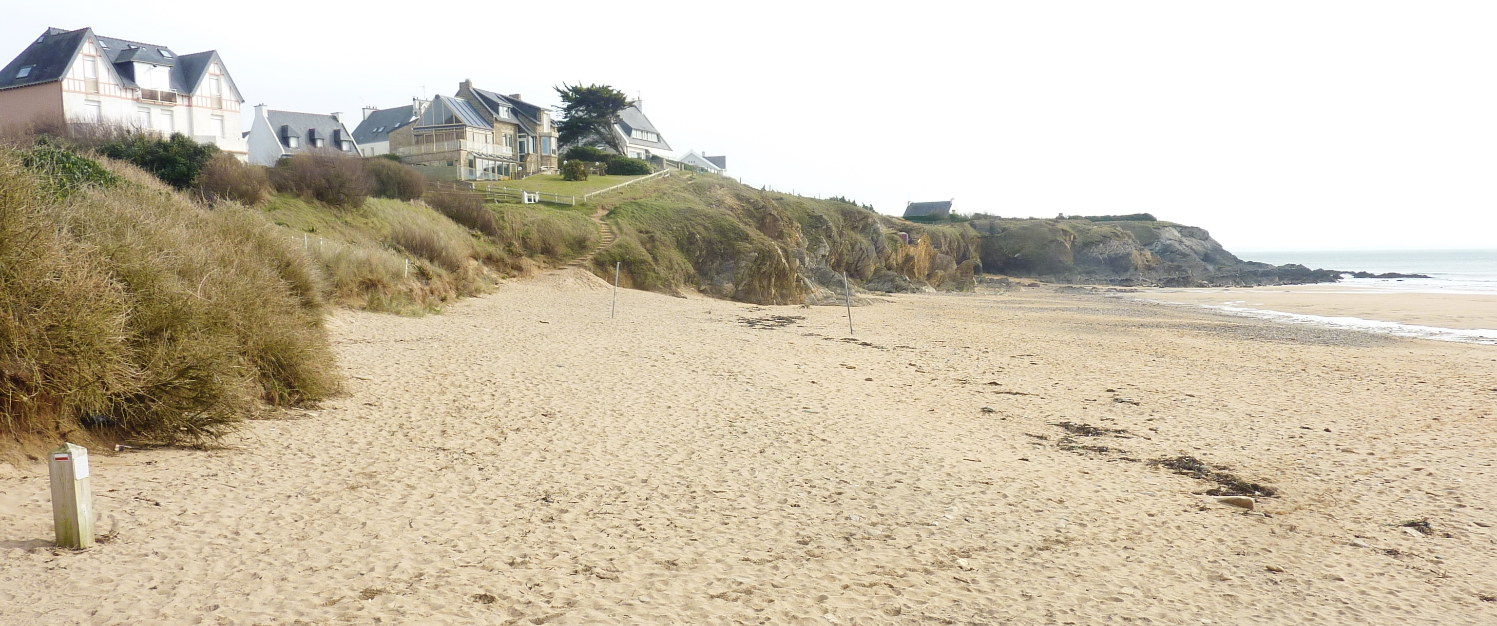 Le Pouldu : la plage de Kerrou (Kérou)